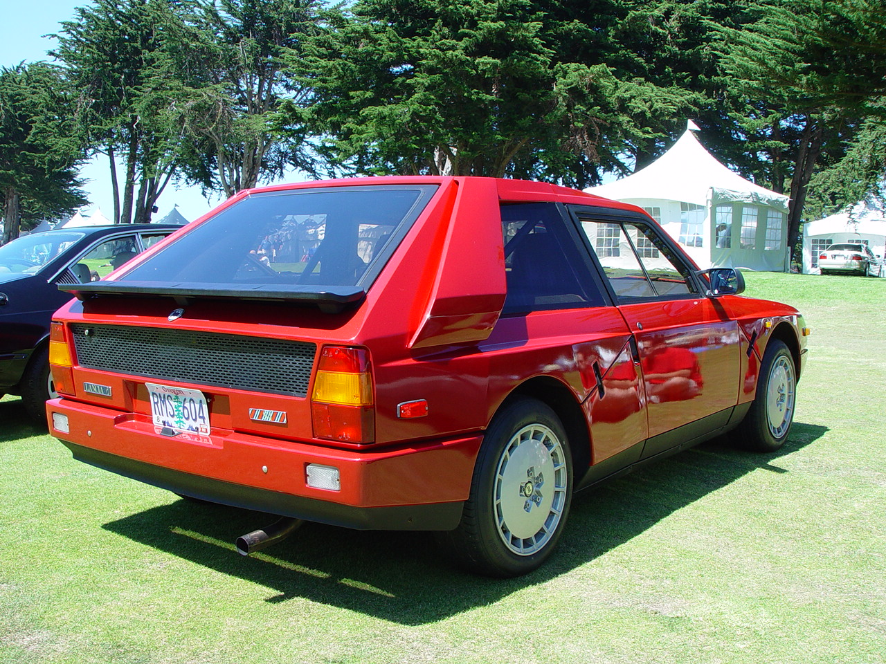 Dsc09589a 1985 Lancia Delta S4 Stradale at 2003 Concorso Italiano, Seaside, CA.